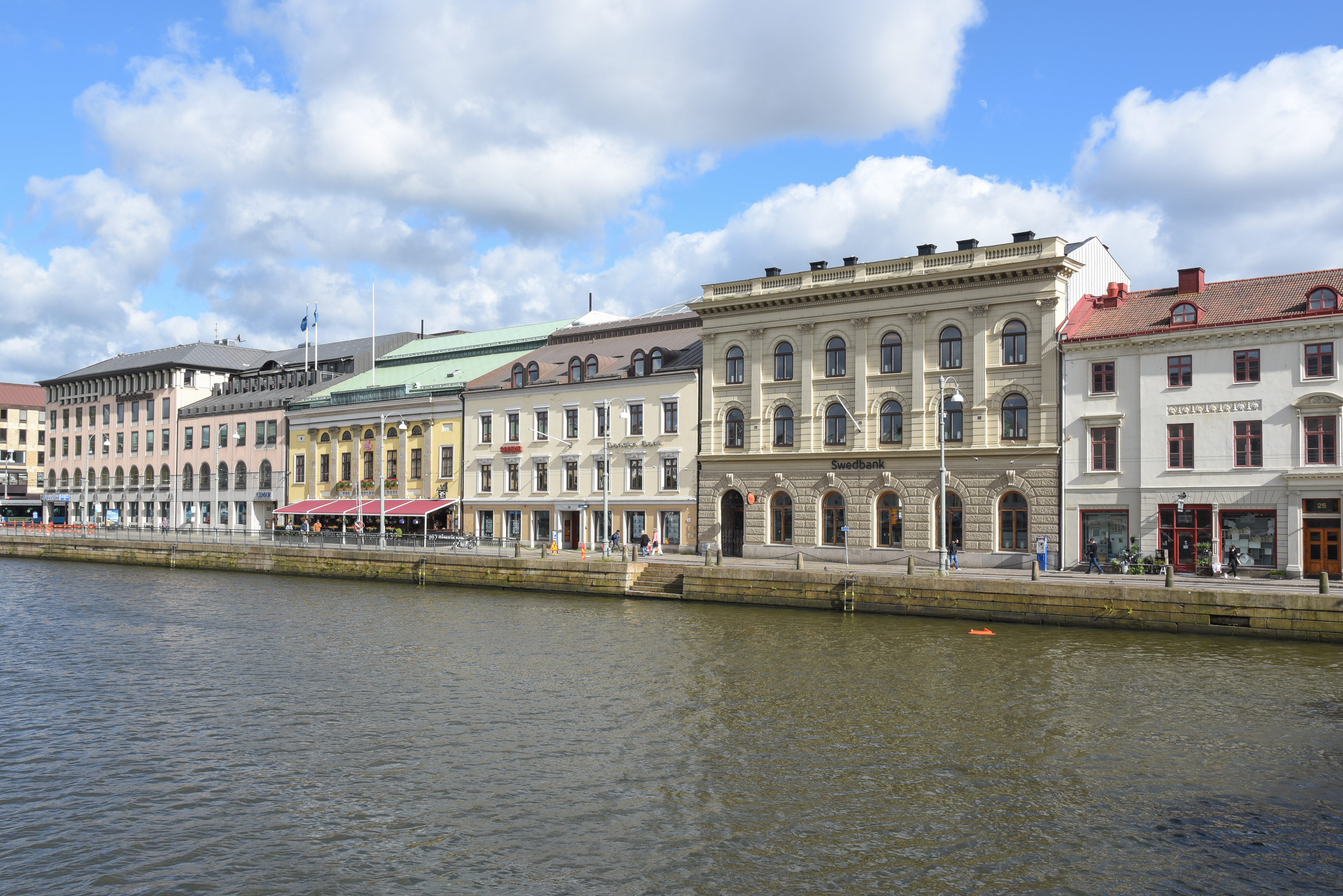 15 kvarteret Frimuraren, Södra Hamngatan 35-25, i stadsdelen Inom Vallgraven i Göteborg.